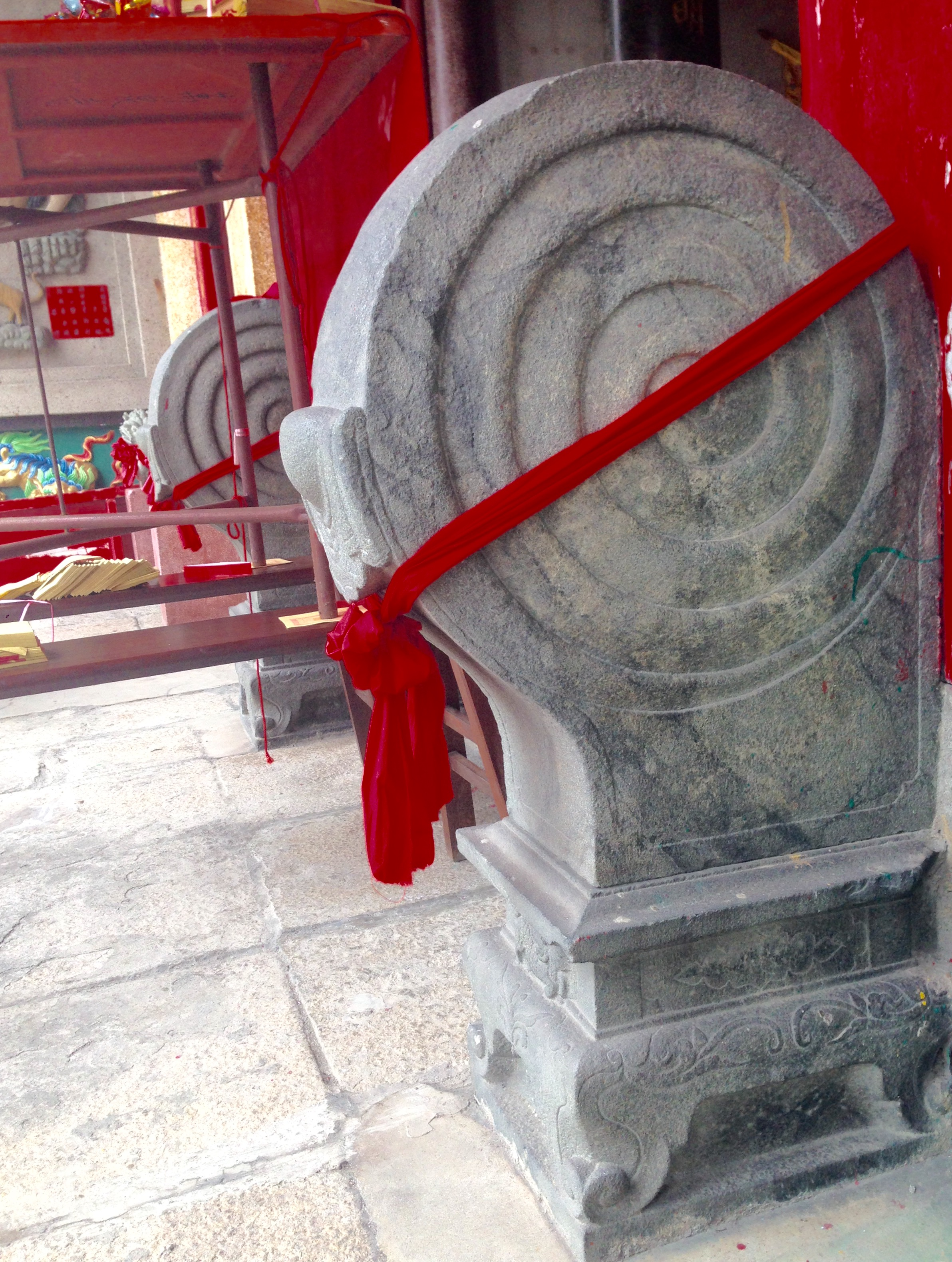 萬丹鄉萬泉寺的石鼓